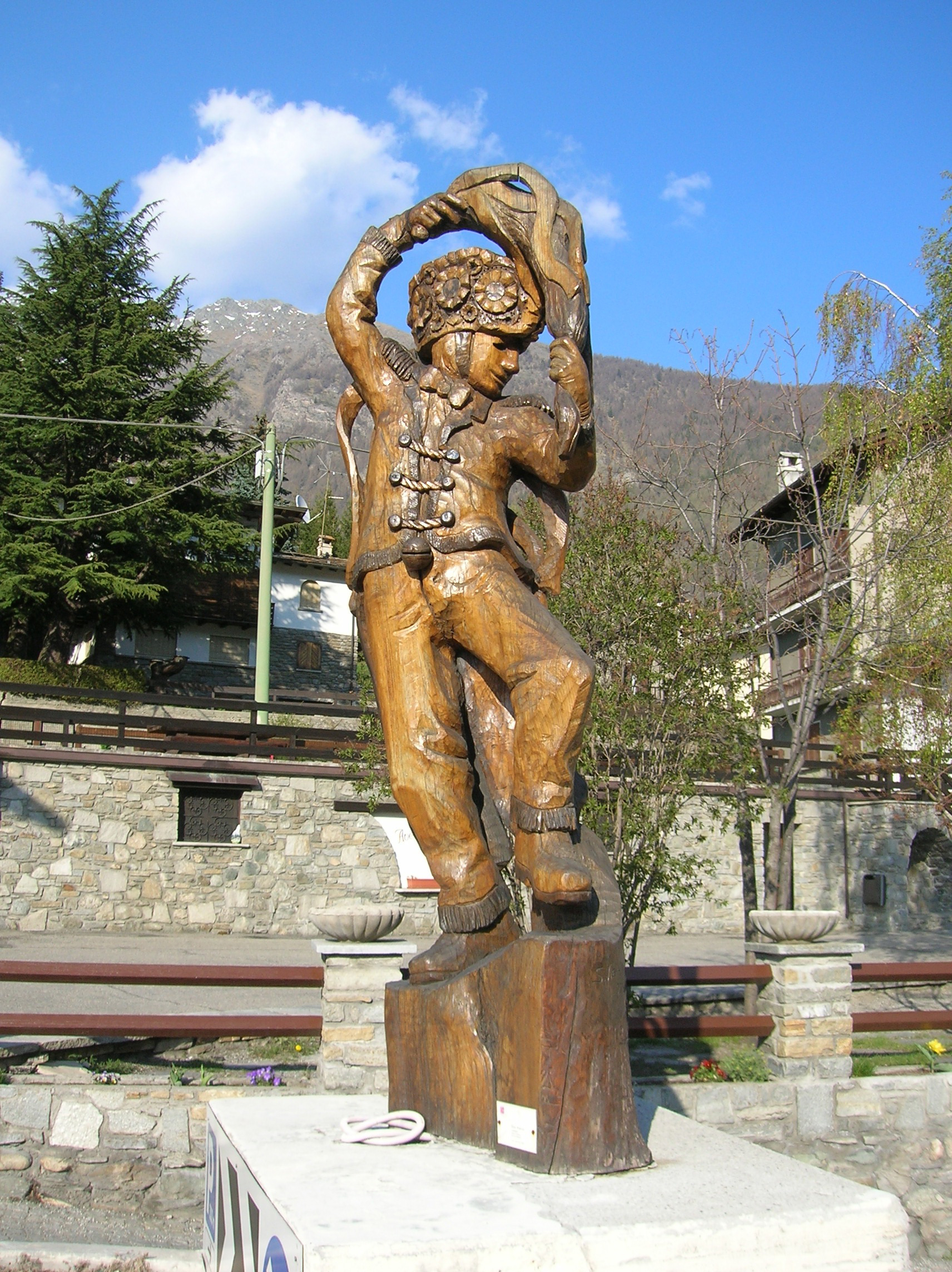 Una scultura dedicata alle Landzette, le maschere tradizionali dei carnevali della Combe Froide (la Valle del Gran San Bernardo). La scultura si trova ad Etroubles, Valle d'Aosta, Italia.